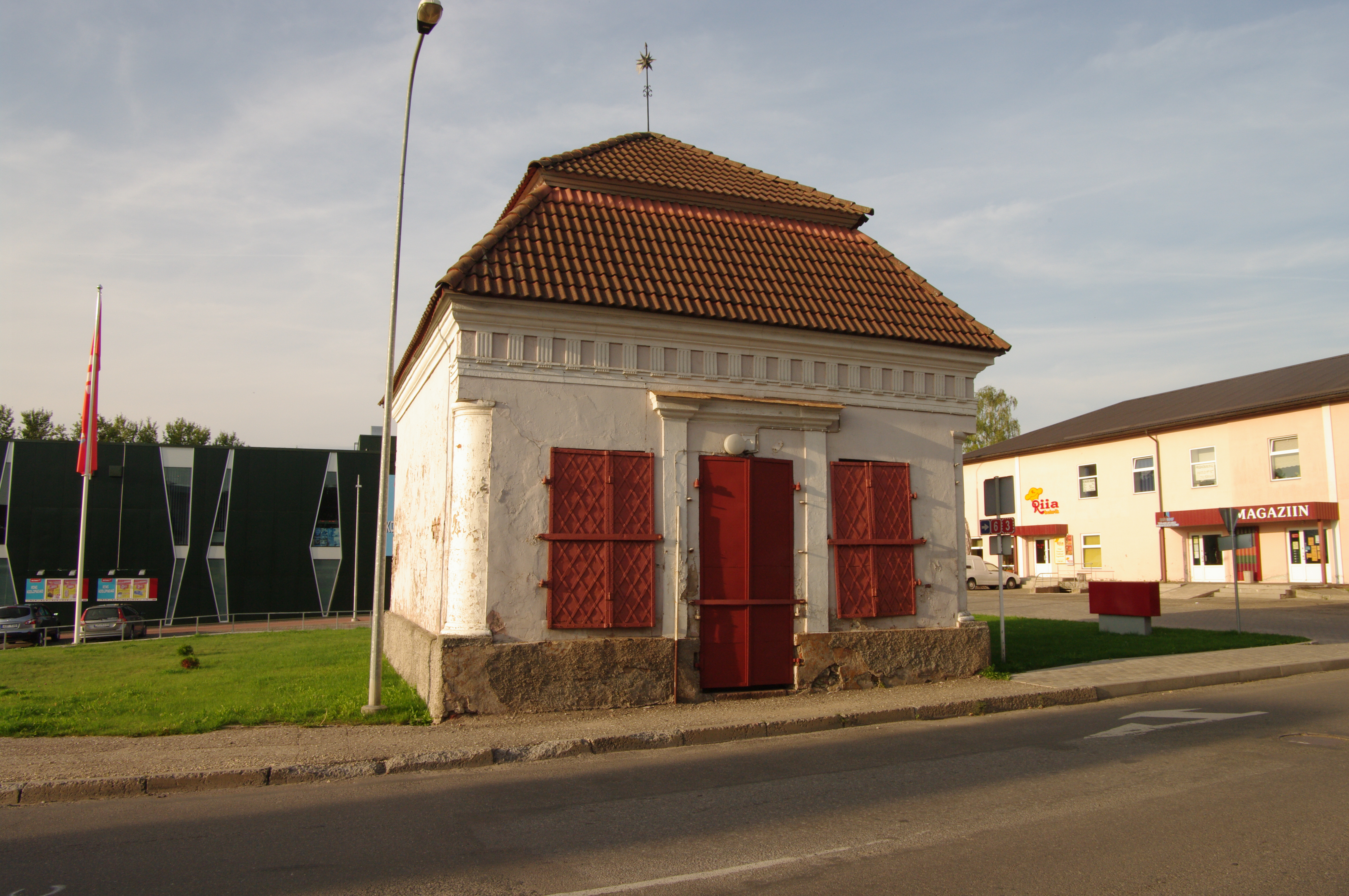 Valga vanim ehitis. Esinduslik varaklassitistlik ehitis ajaloolises linnasüdamikus.